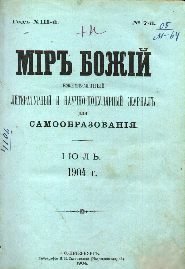 "Мир Божий", обложка журнала, 1904